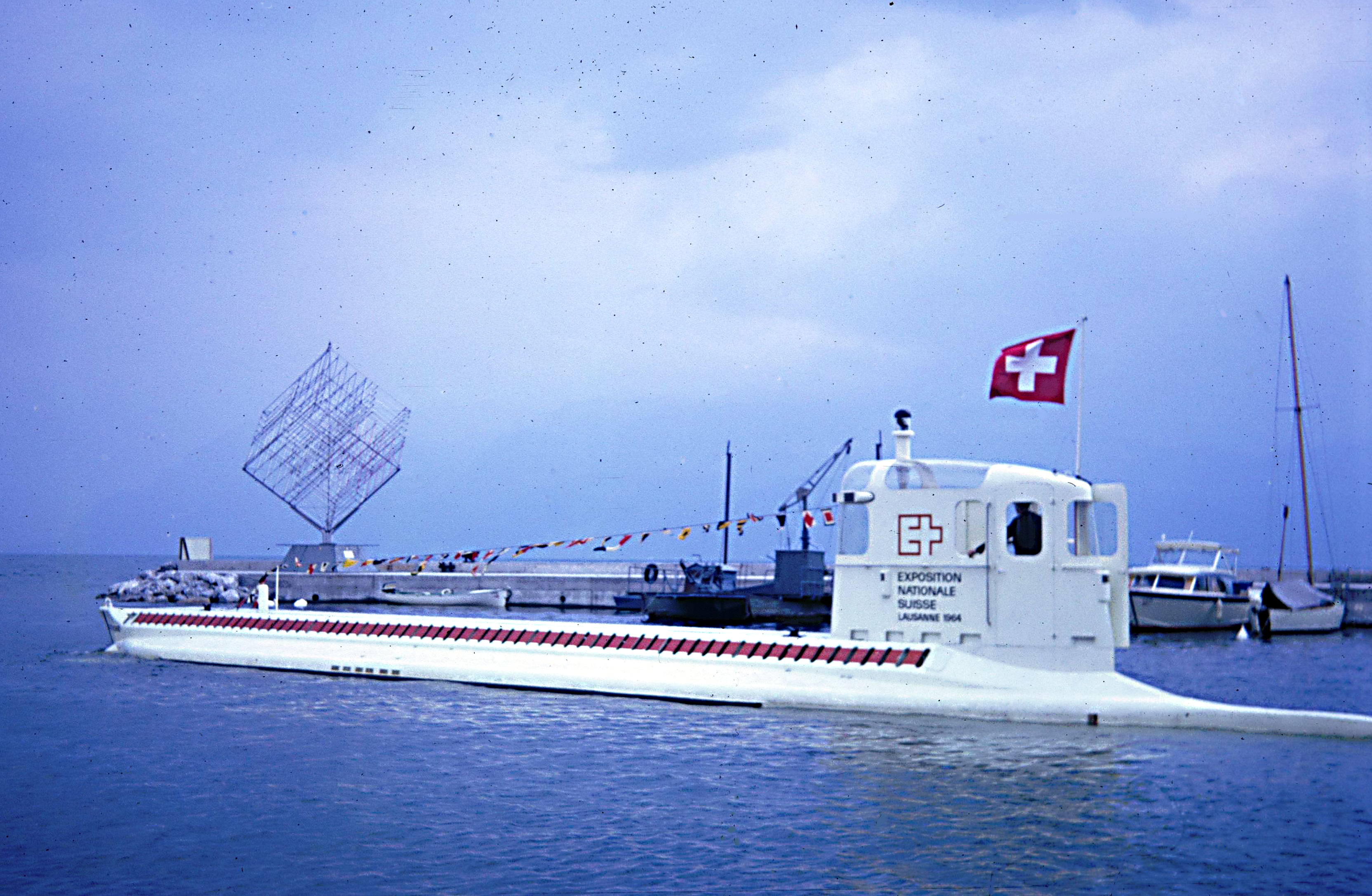 Expo 64, Lausanne VD, Schweiz